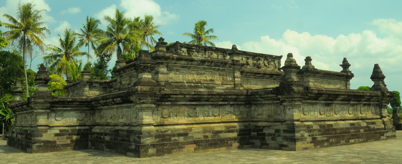 Back view of candi Penataran, Nglegok, Blitar, Jawa Timur.